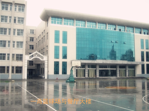 长葛一高餐厅大楼